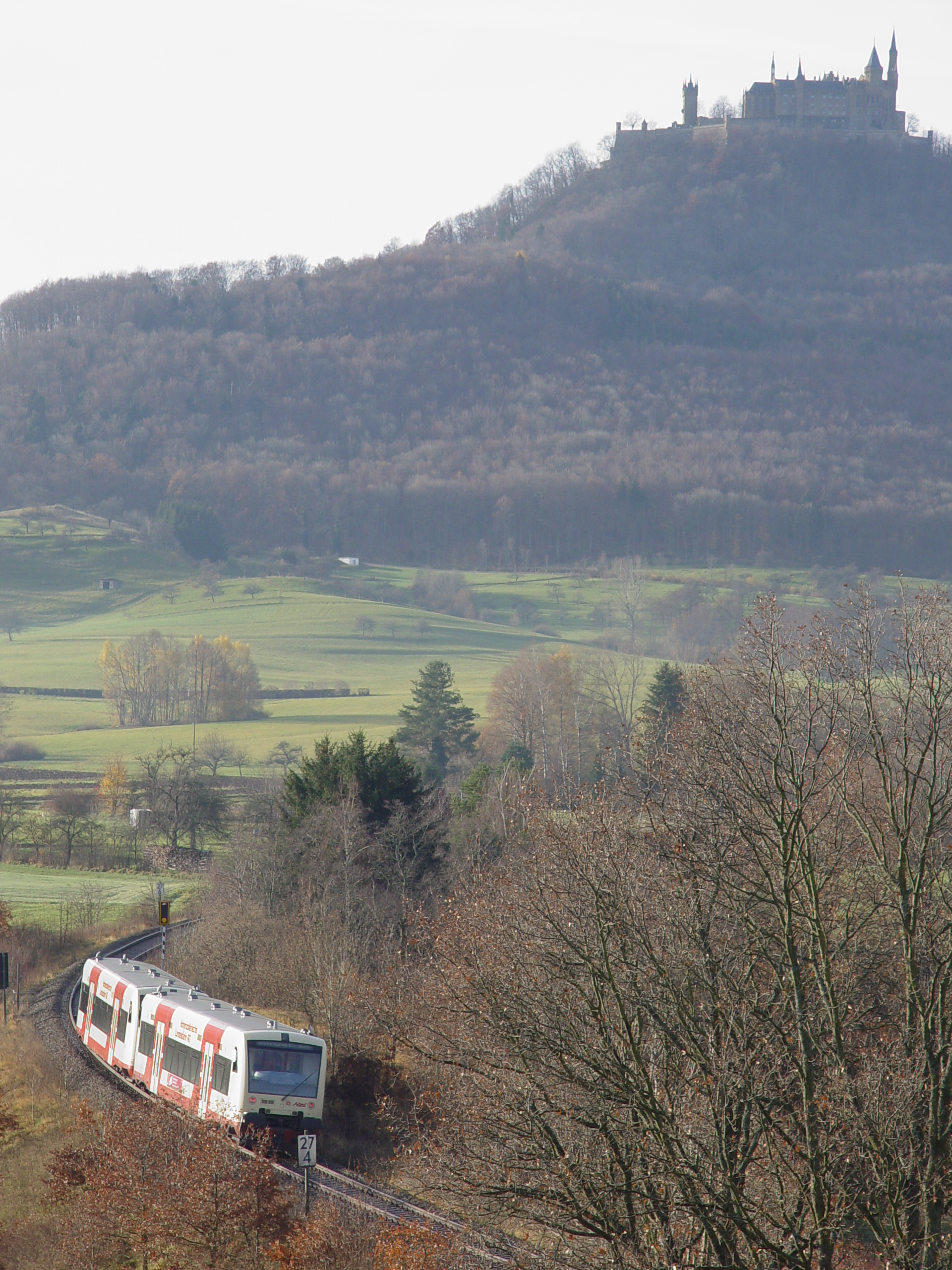 Ein Zug der Hohenzollerischen Landesbahn kurvt bei Hechingen an der Burg Hohenzollern vorbei. Bild gemacht am 27.11.2006. own work - Bild selbst gemacht. Photographed by: Zollernalb